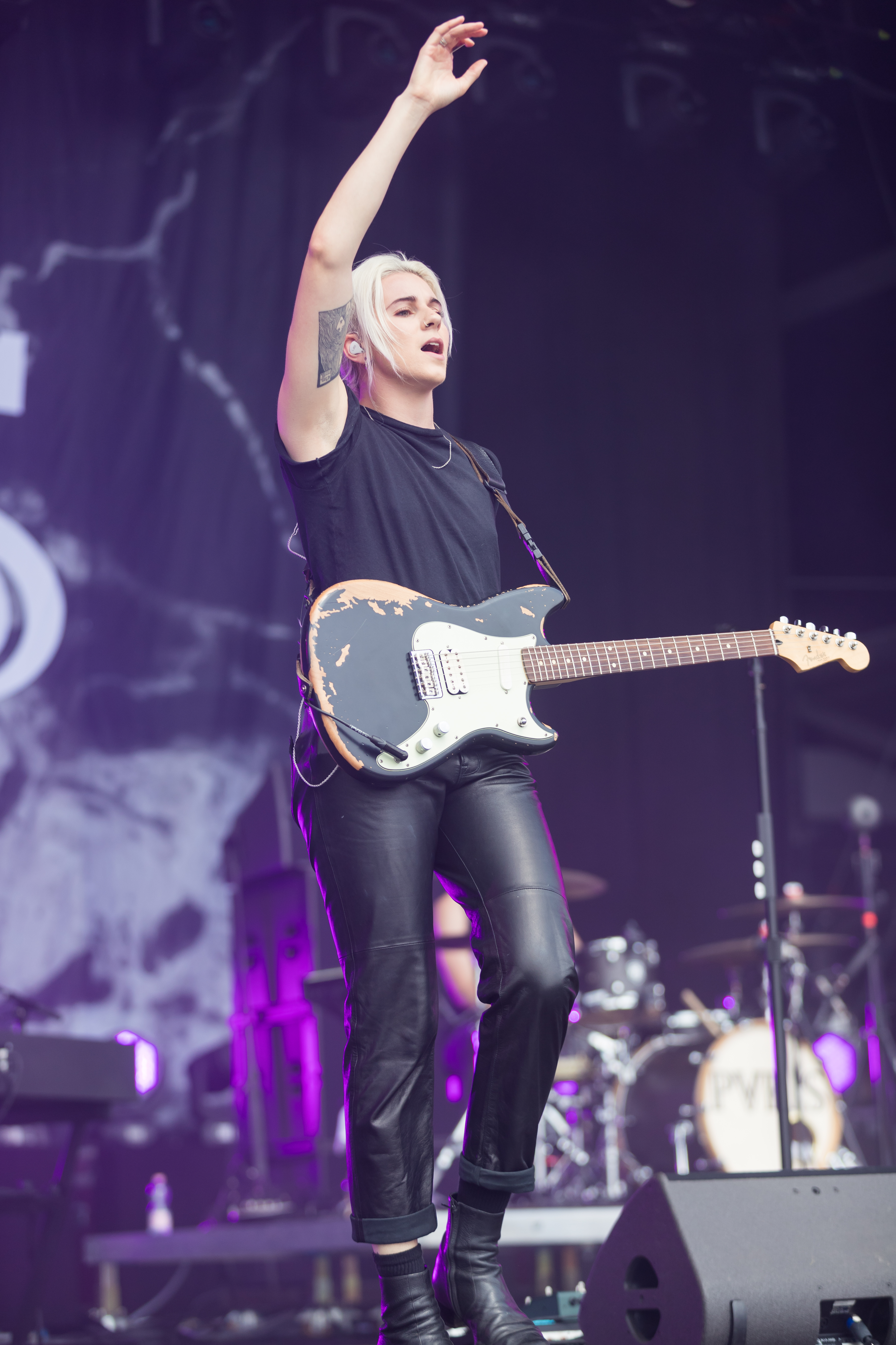 PVRIS @ Rock am Ring 2018